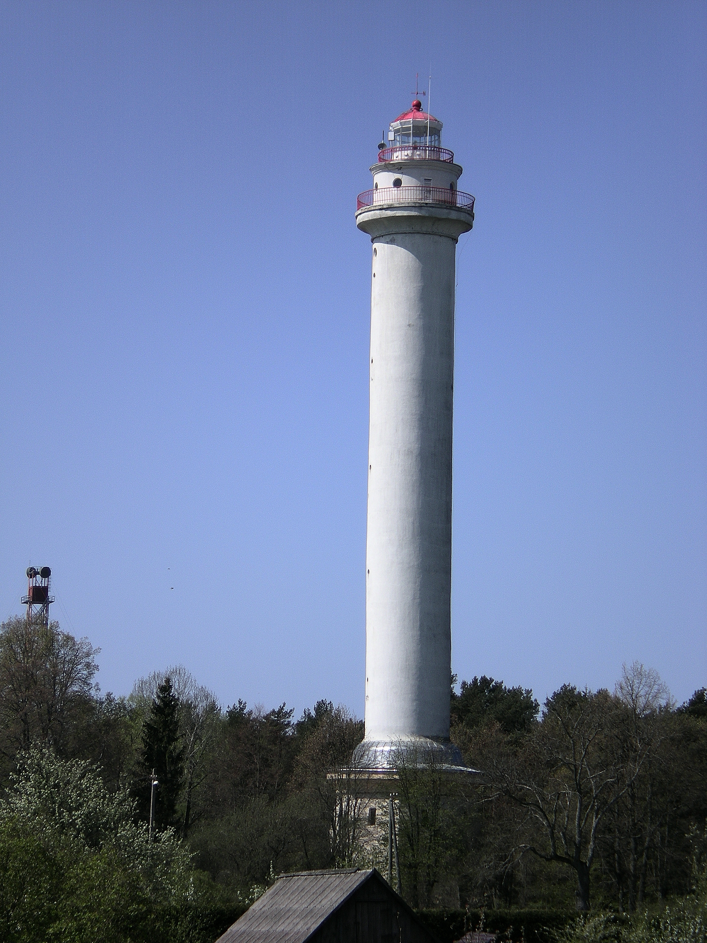 Miķeļbāka (Miķeļtornis). Mikelbaka lighthouse